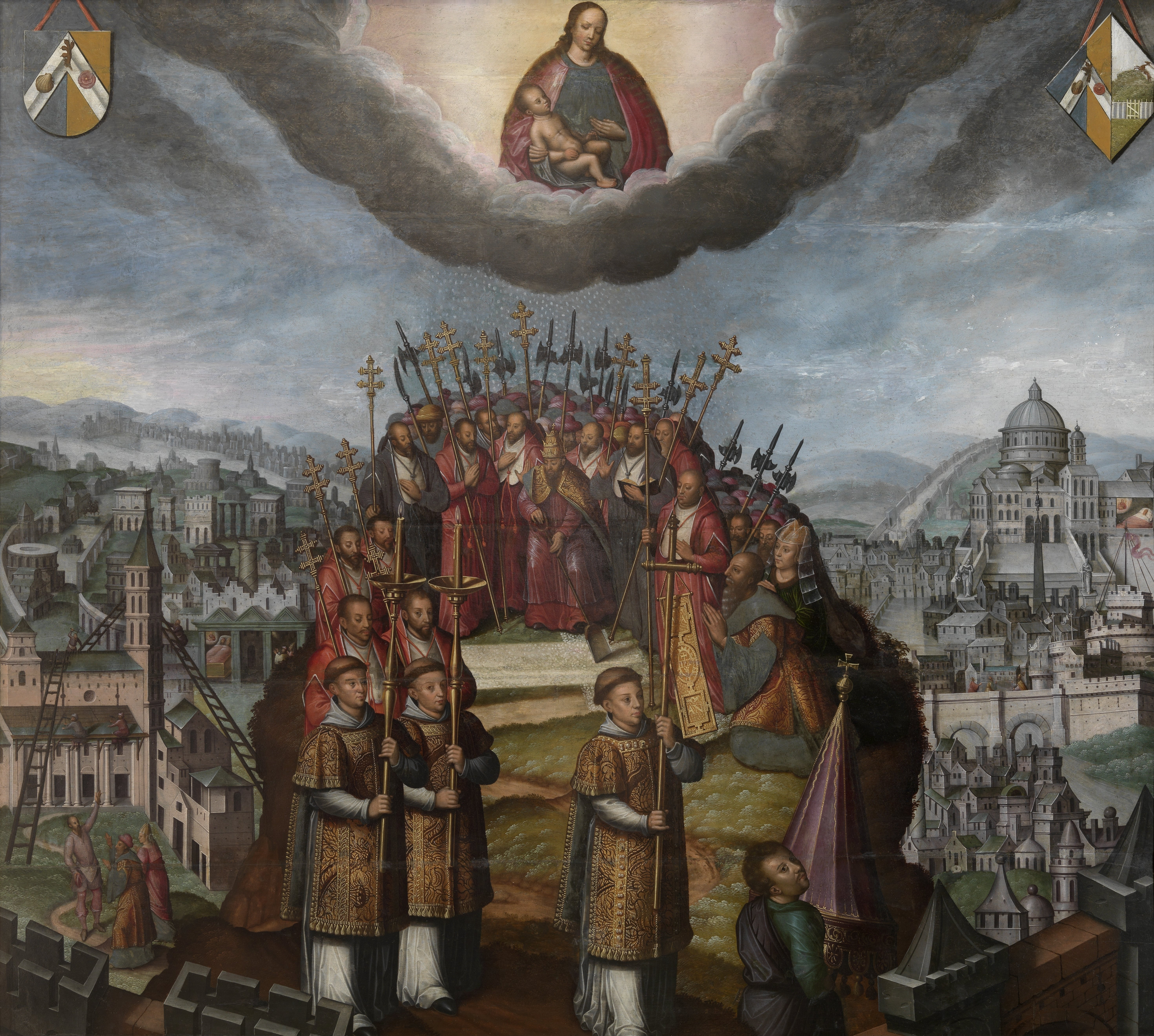 Schilderij van Antoon Claeissens in de Onze-Lieve-Vrouwekerk te Brugge.